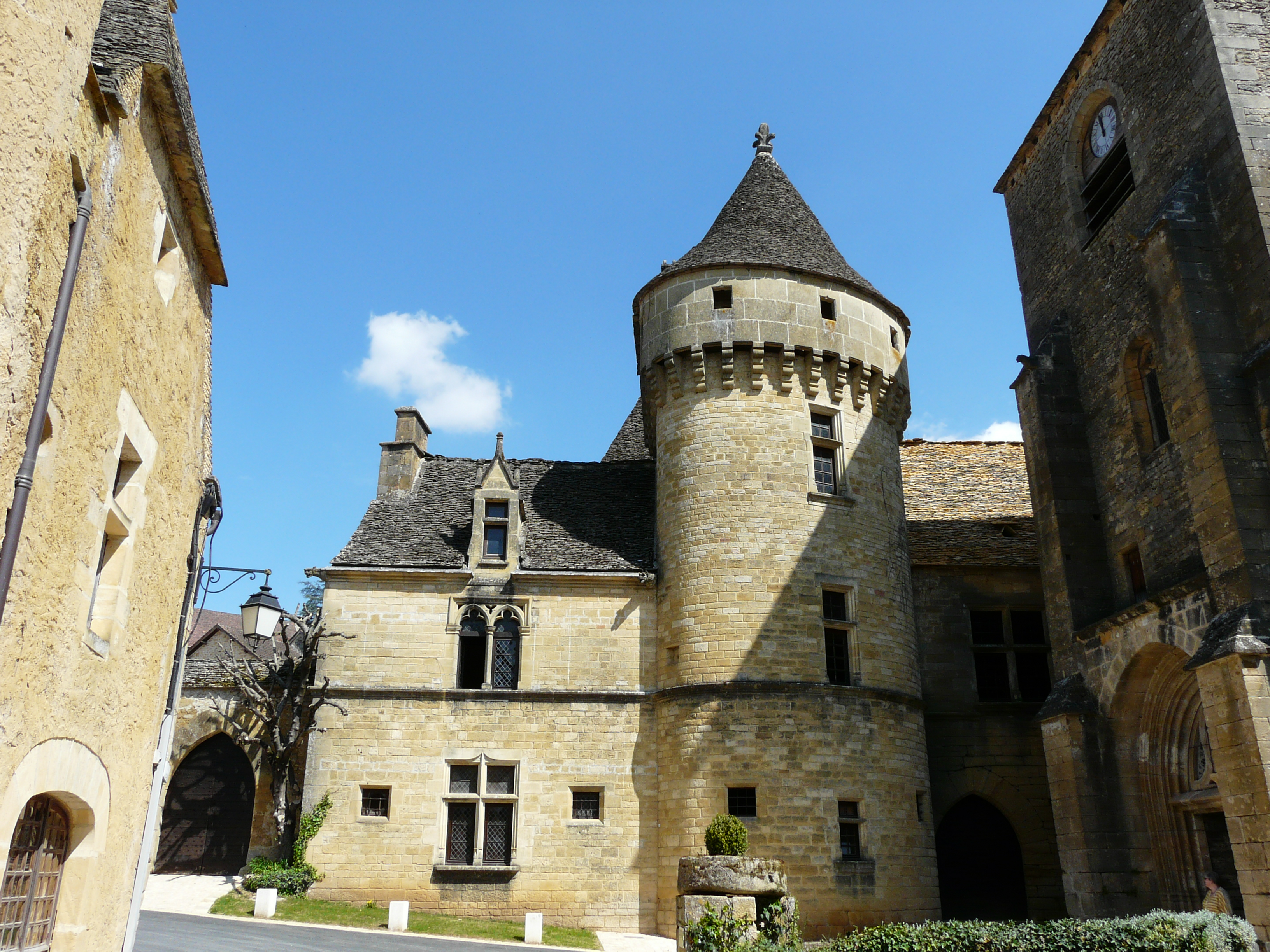 Le côté sud du château de Saint-Geniès, Dordogne, France.